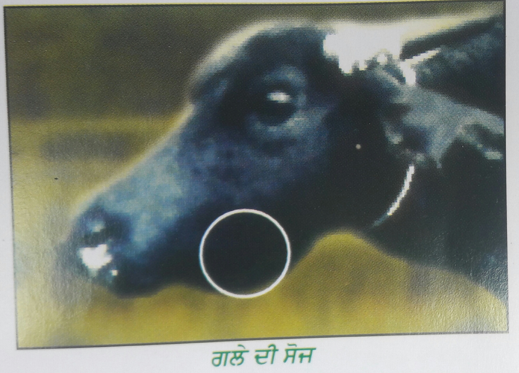 ਪੰਜਾਬੀ: ਗਲੇ ਦੀ ਸੋਜ਼